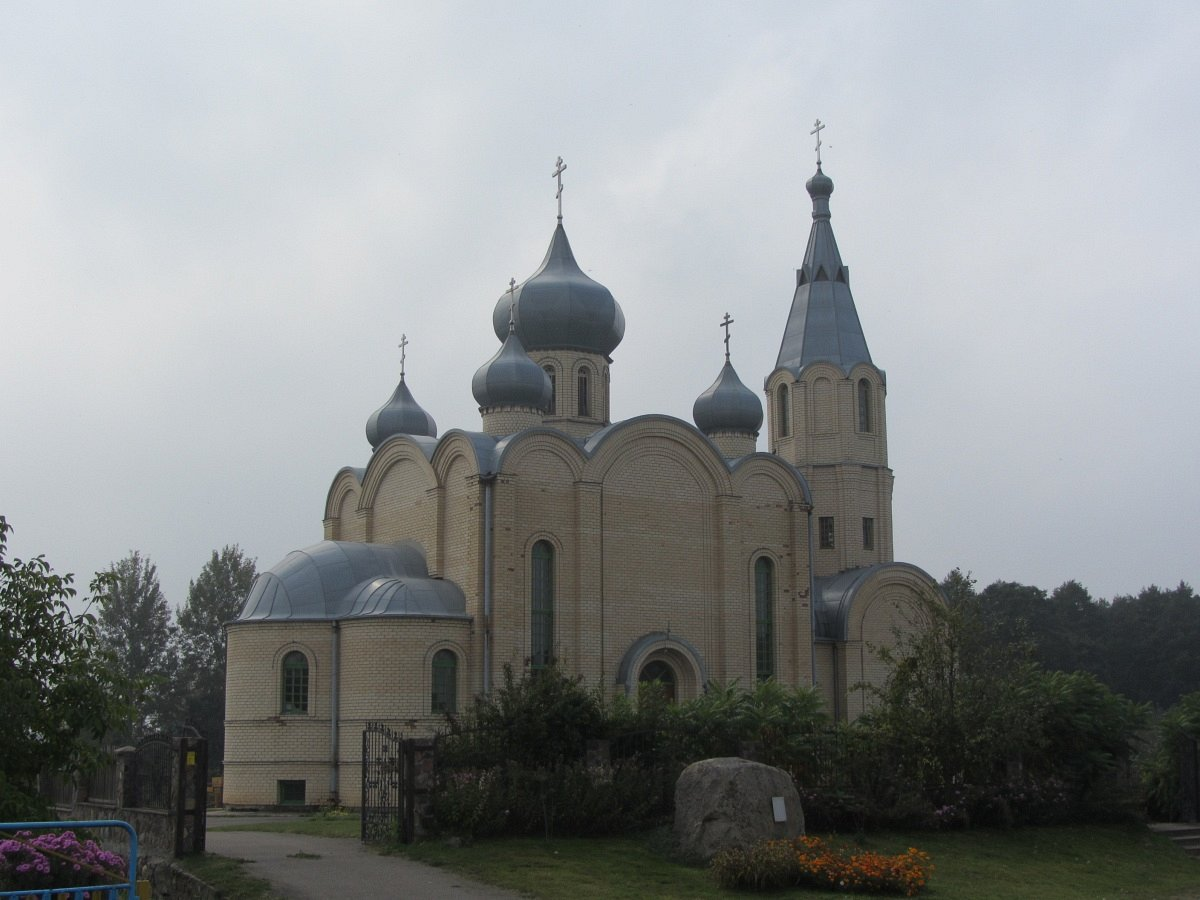 Расна. Царква